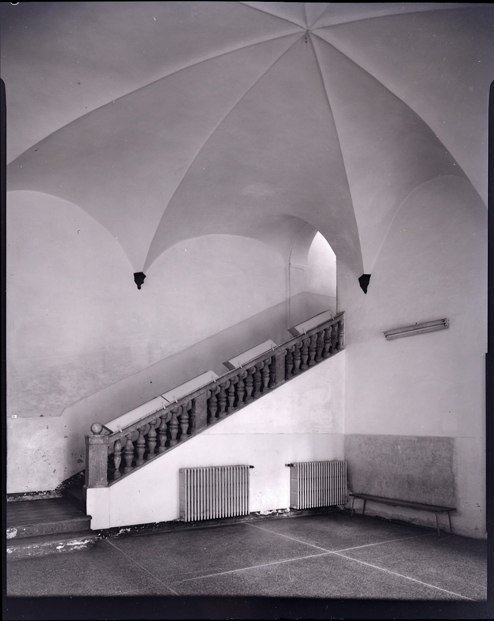 Servizio fotografico : Genova, 1964 / Paolo Monti. - Buste: 5, Fototipi: 7 : Negativo b/n, gelatina bromuro d'argento/ pellicola ; 10x12. - ((Serie costituita da 5 buste sciolte di negativi identificati con i nn.: 8317, 8318, 8319, 8320, 8321. - Le buste identificate con i nn. 8317, 8320 contengono ciascuna 2 negativi identificati con lo stesso numero. - Il negativo identificato con il numero 46397 è stato realizzato per Zodiac. - Occasione: Documentazione per la pubblicazione: Italia Nostra (a cura di), "Le ville genovesi", catalogo della mostra, Genova 1962, Genova, Comune di Genova, 1967. - Fonte: Monografia di Italia Nostra (a cura di): Le ville genovesi, catalogo della mostra, Genova 1962, Genova, Comune di Genova (1967). - Fonte: Lettera di Paolo Monti: I. Carteggi/ Genova - Enrico (1963-1966), presso Archivio Paolo Monti. Camicia con documenti dattiloscritti e manoscritti vari relativi al lavoro eseguito per Italia Nostra: preventivi, lettere, inventari. - Fonte: Agenda di Paolo Monti: Monti/ 2/ 6 giugno 1964 - 31 marzo 1966/ 8194-12420 (1964-1966), presso Archivio Paolo Monti